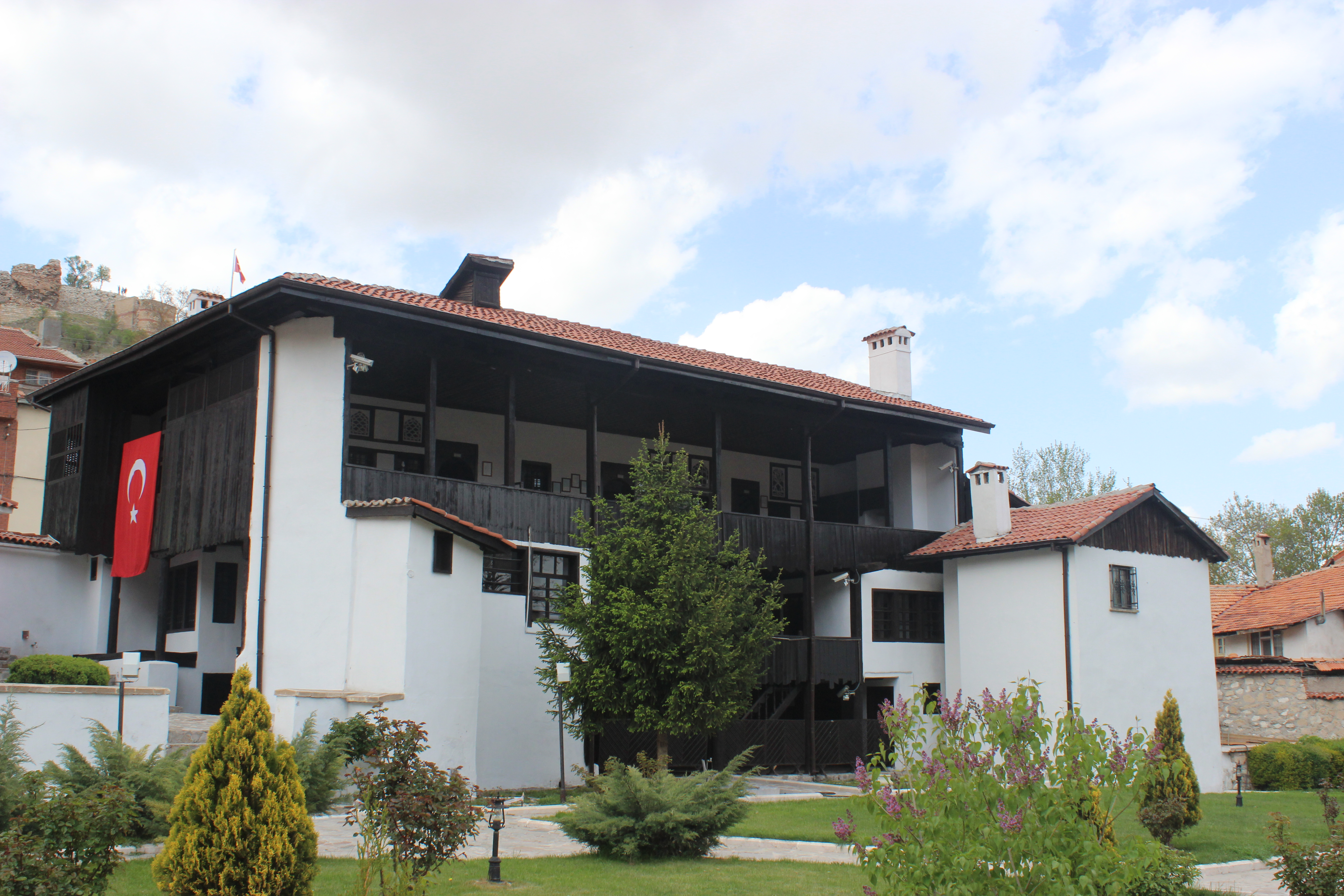 Kütahya-Kossuth Müzesi